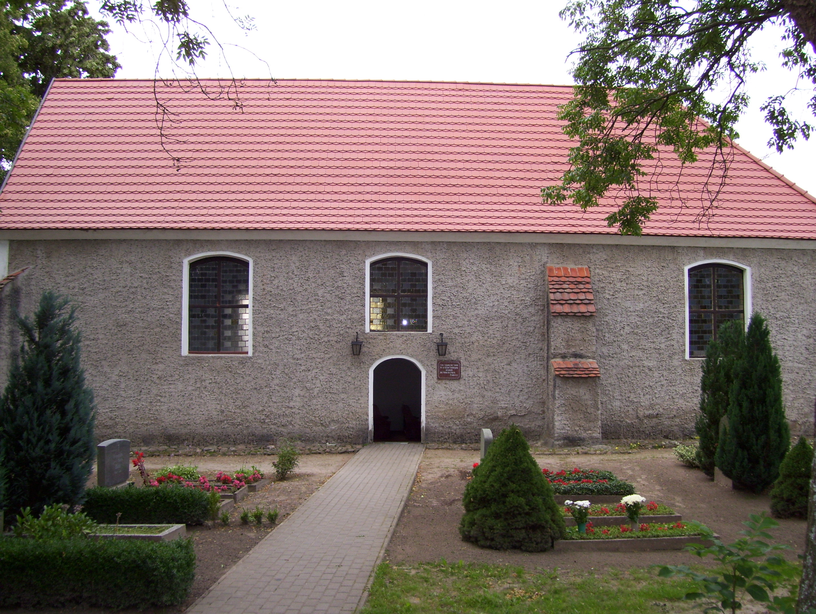 Kirche in Sophienhof bei Loitz, Südseite